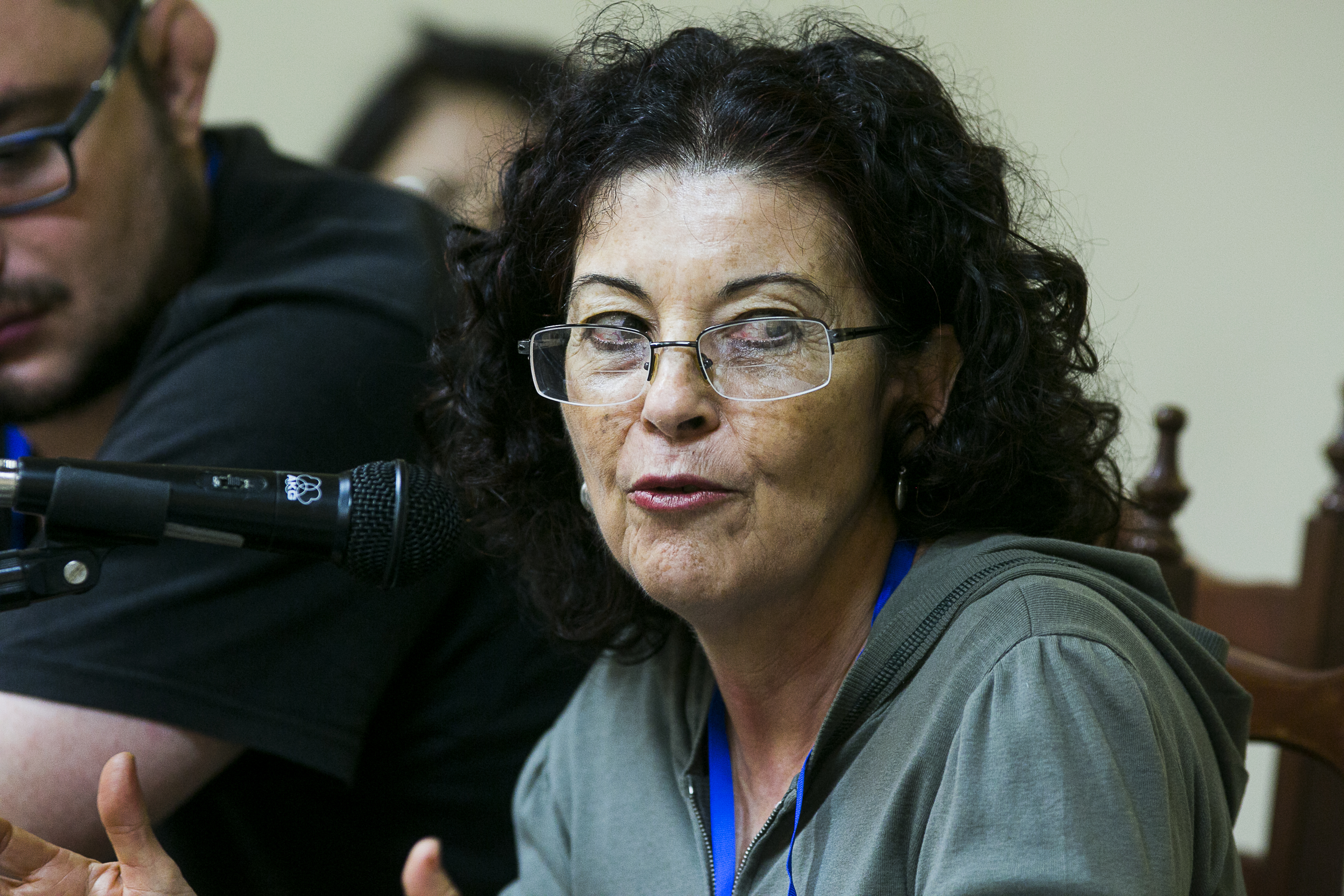 Anacristina Rossi (1952), escritora costarricense, autora de obras como Limón Reggae, María la noche y La loca de Gandoca.